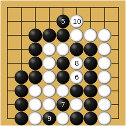 (Étape 3) Exemple de molasses ko au jeu de go